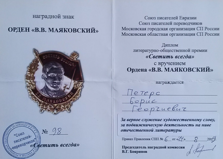 Петерс Б.Г. Орден Маяковского 240809